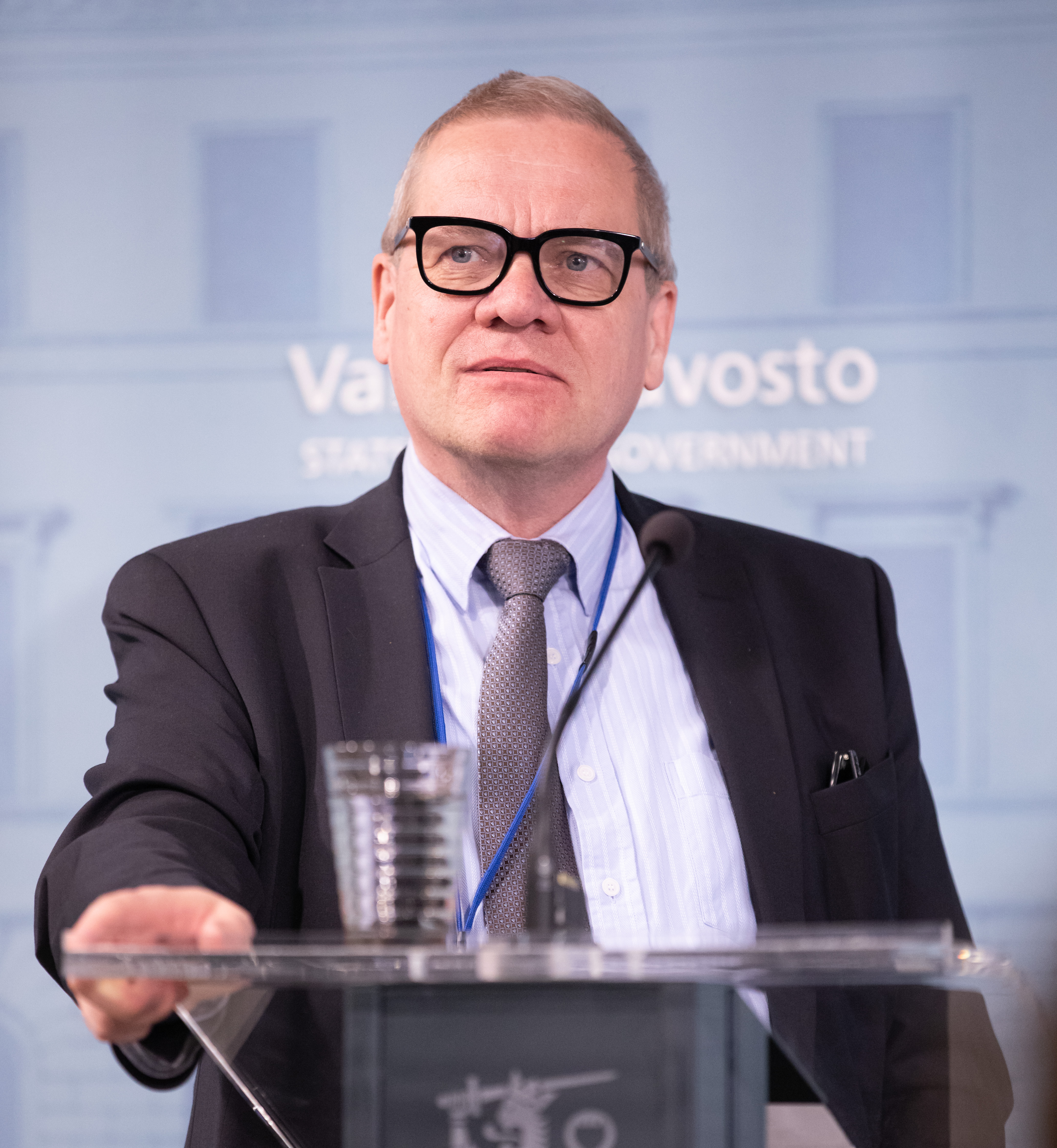 Ministeriöiden kansliapäälliköiden tiedotustilaisuus Martti Hetemäen työryhmän raportista 1.6.2020. Liikenne- ja viestintäministeriön kansliapäällikkö Harri Pursiainen.